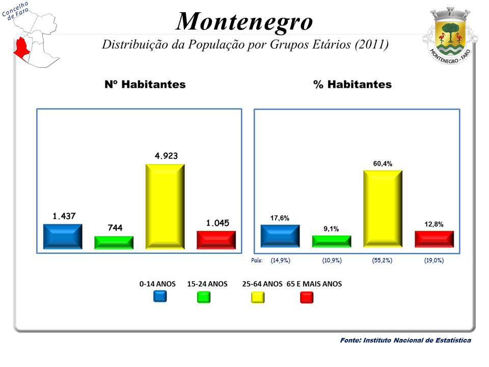 Censos 1864/2011